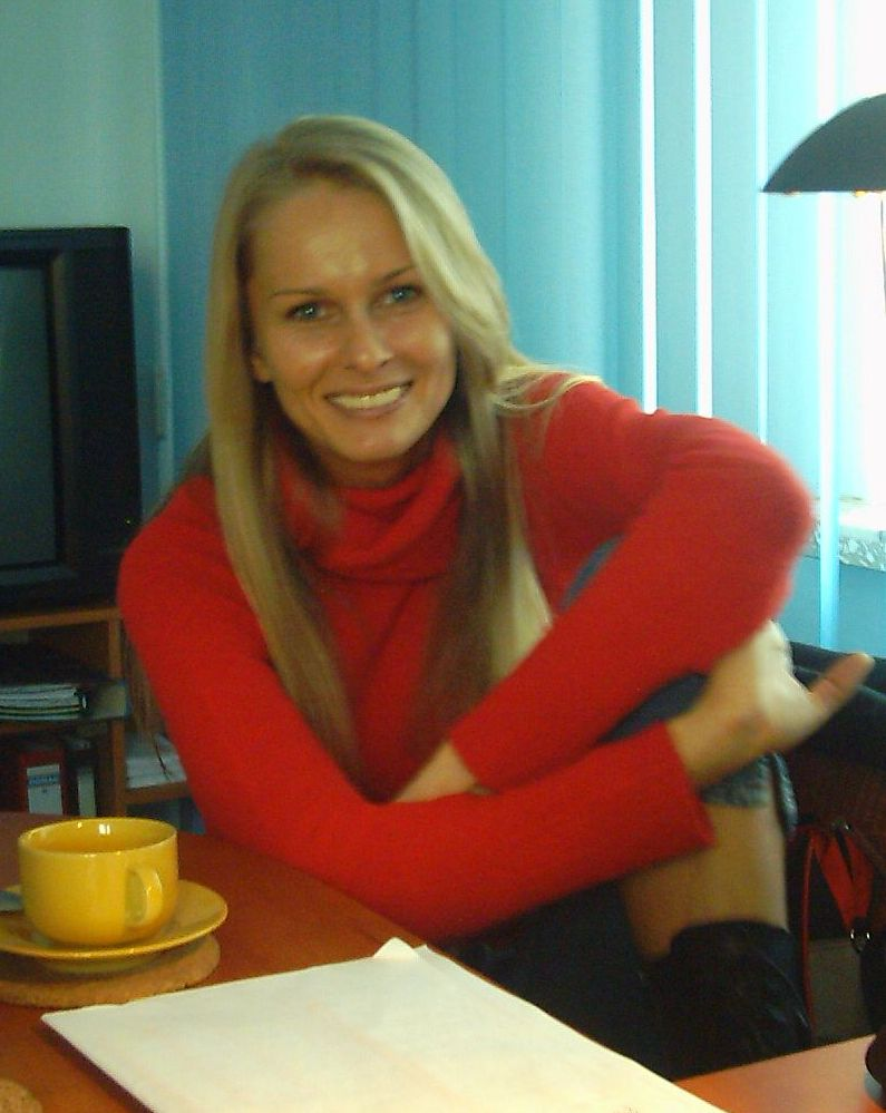 Ewa Tylecka Miss Polonia 1995. Autor: Andrzej Załużny